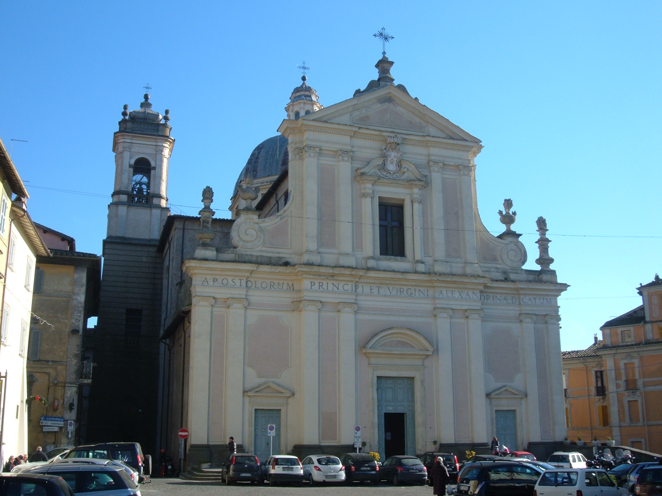 Duomo (Ronciglione)